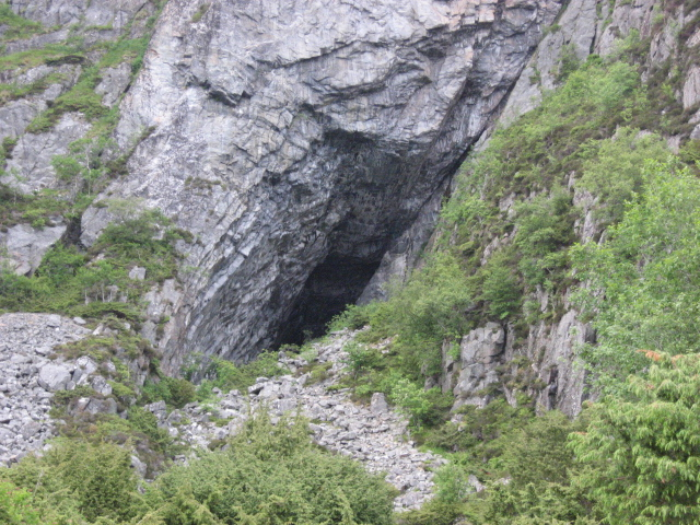 Skjonghelleren, Valderøy, Norge